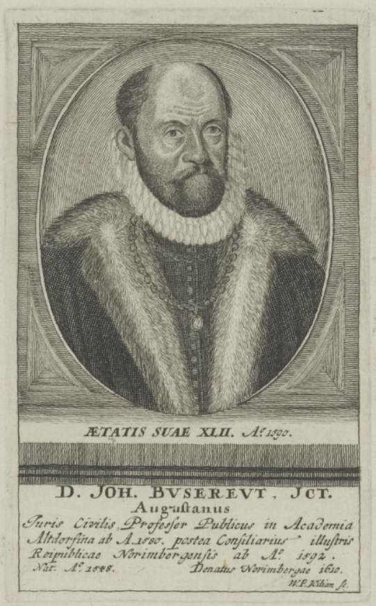 Johannes Busereuth (1548–1610) im Jahre 1590 im Alter von 42 Jahren, Kupferstich